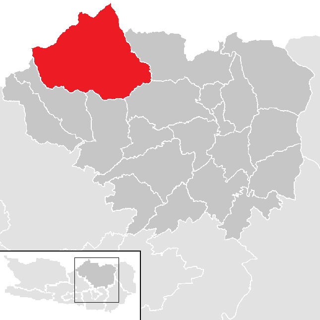 Bezirk Sankt Veit an der Glan